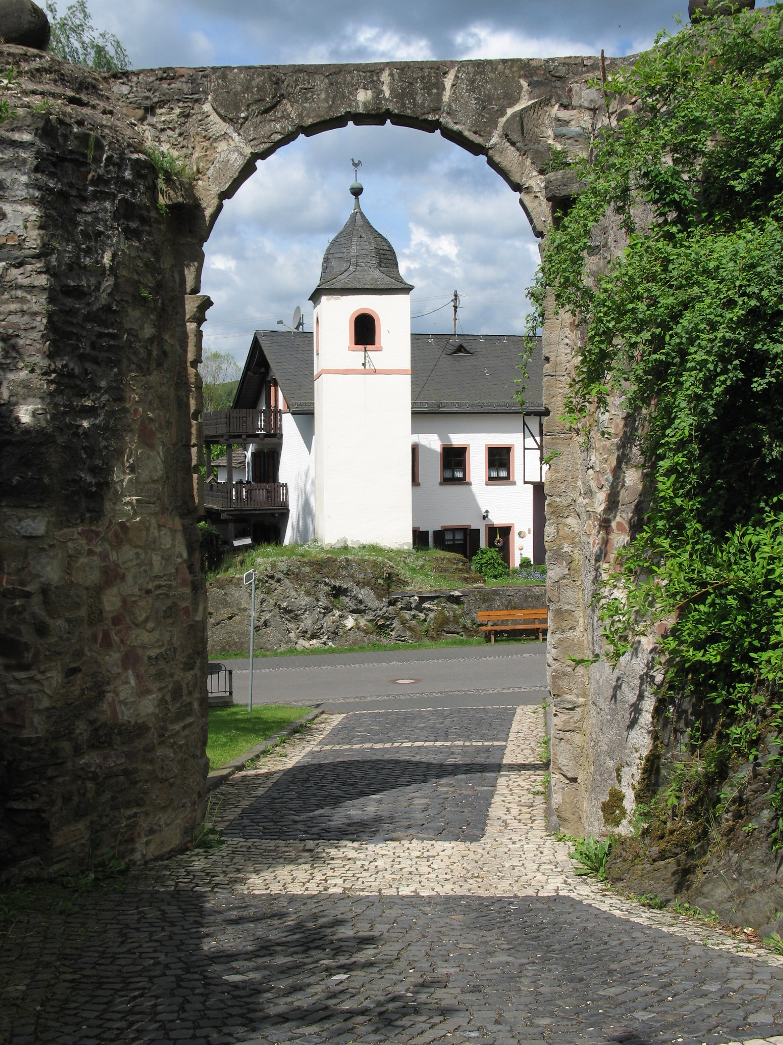 Blick aus dem Tor der Ruine der Burg Dhronecken auf den Glockenturm der Gemeinde. Fotografiert und zur Veröffentlichung freigegeben von Reinhold Anton aus Thalfang.